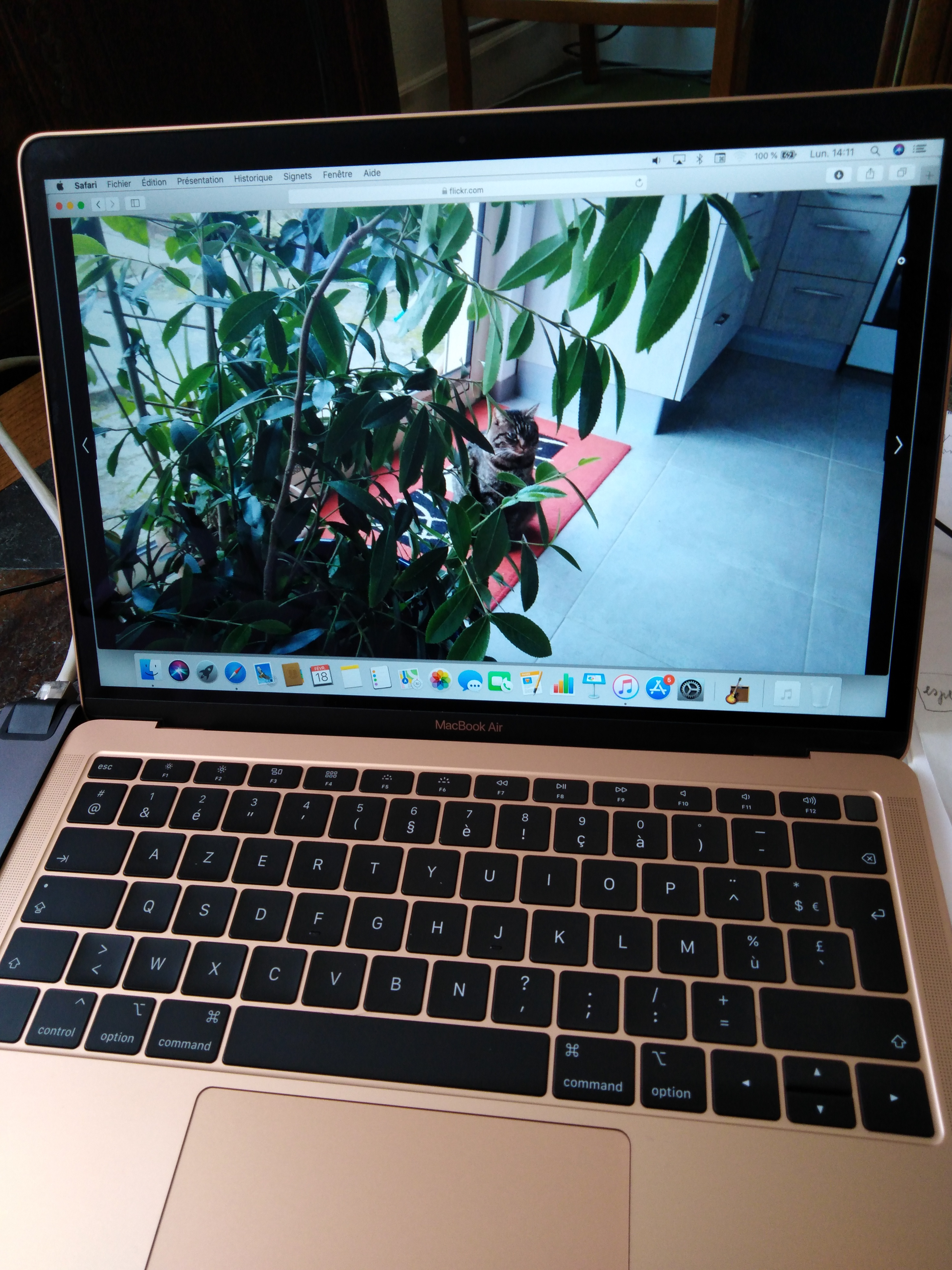 Tekokomputilo MacBook Air 2018 kun Retina ekrano